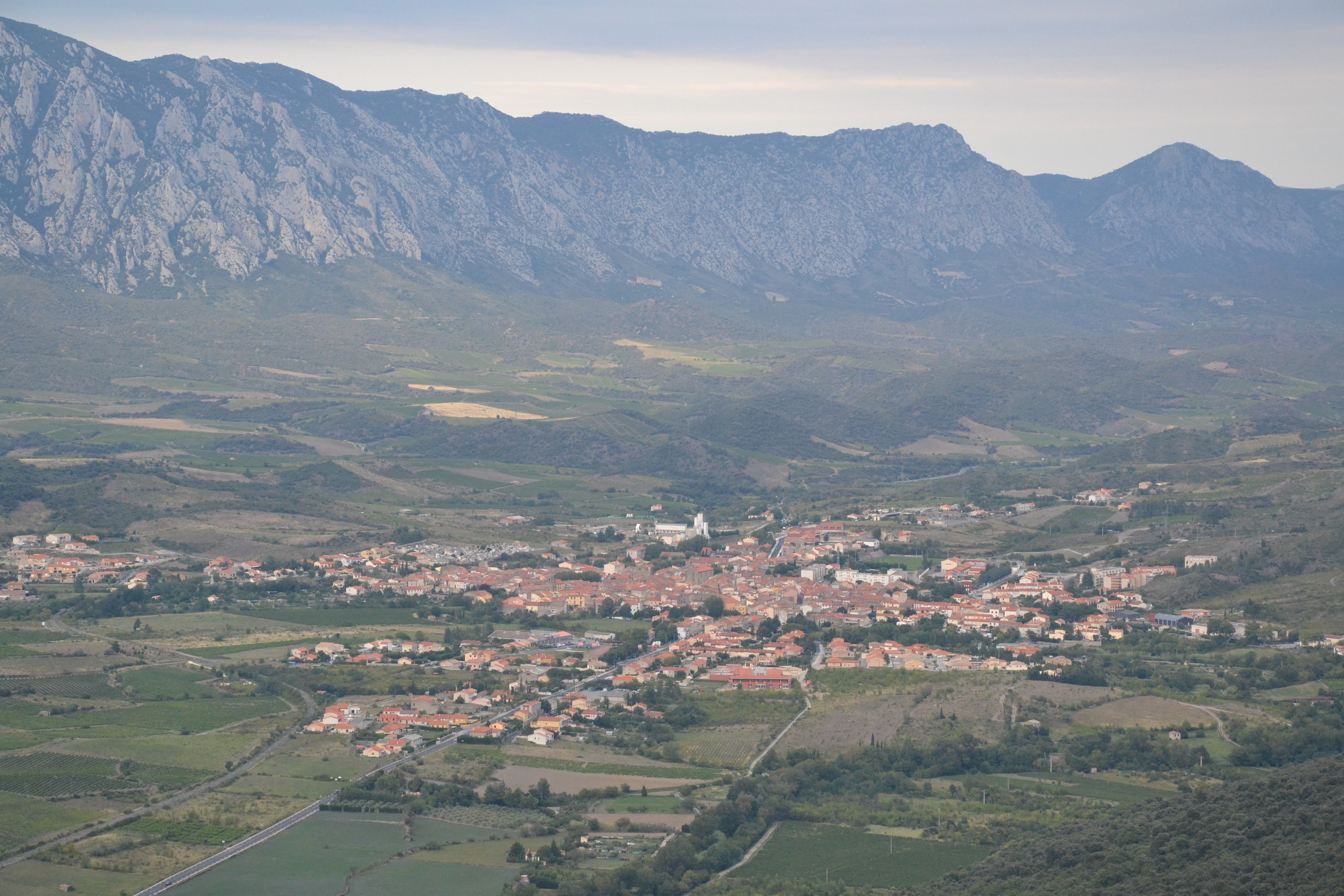 Saint-Paul-de-Fenouillet (P.-O., France) depuis le sentier géologique de Saint-Martin.